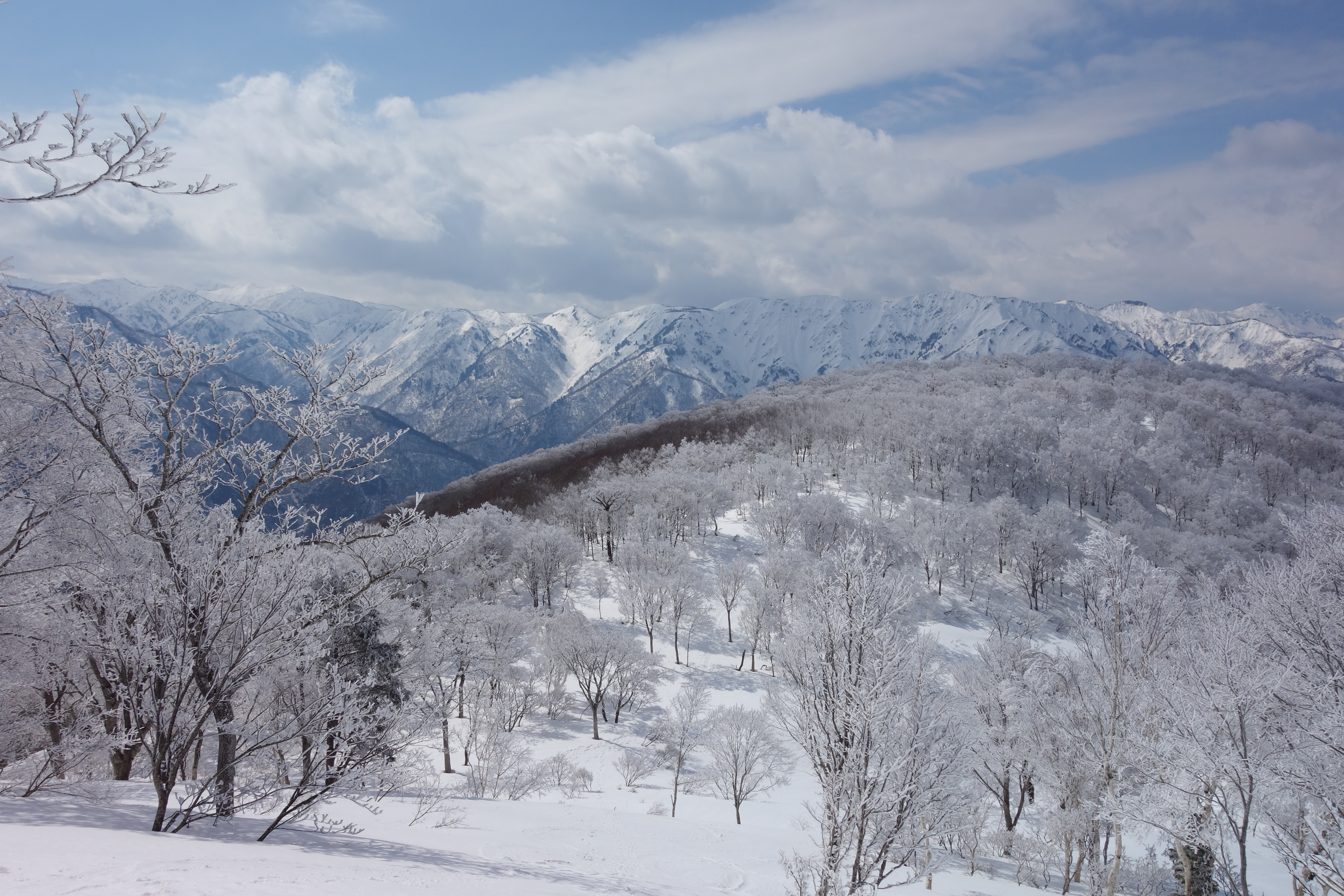 帰雲山から白山・野谷荘司山